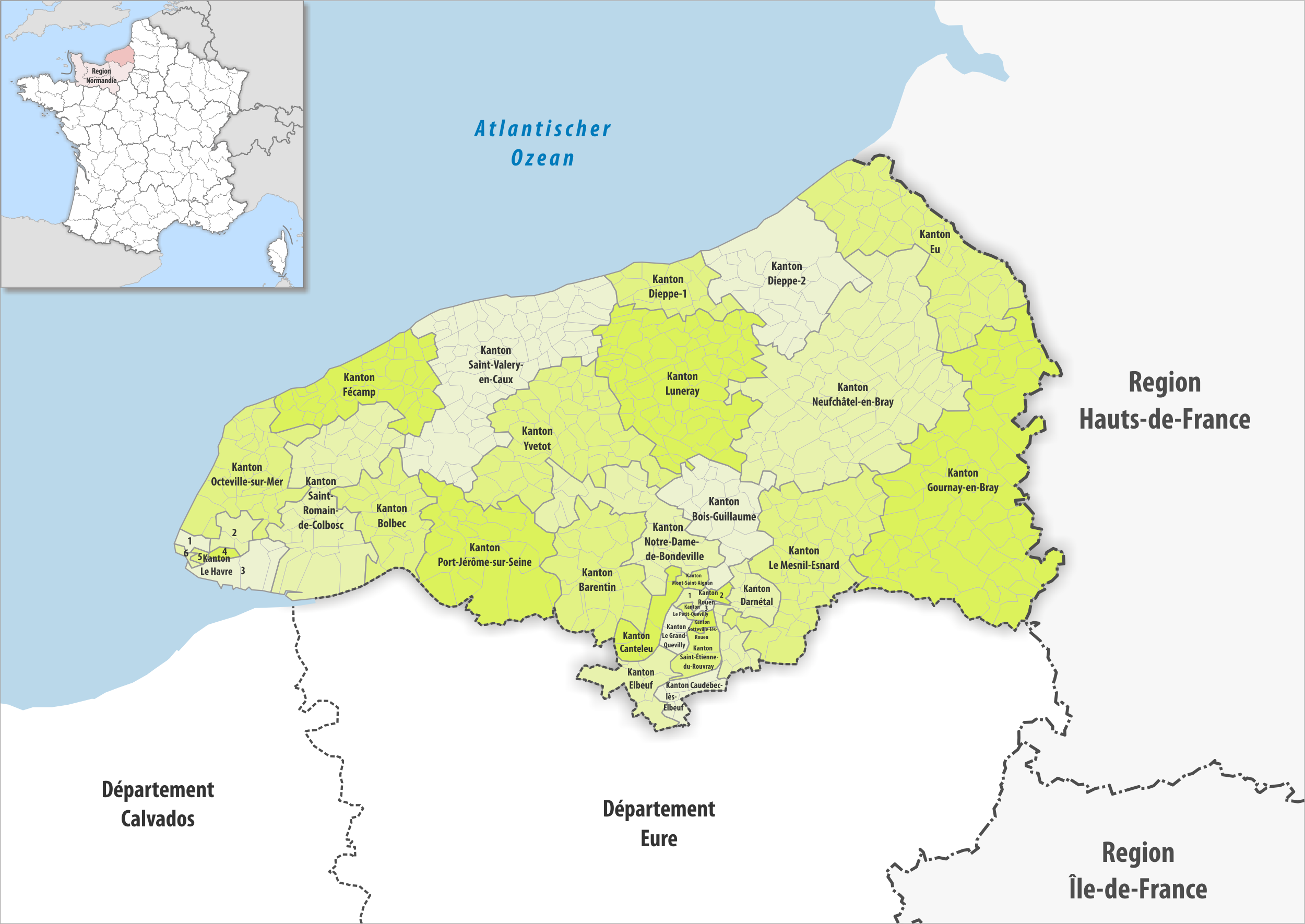 Gemeinden und Kantone im Departement Seine-Maritime